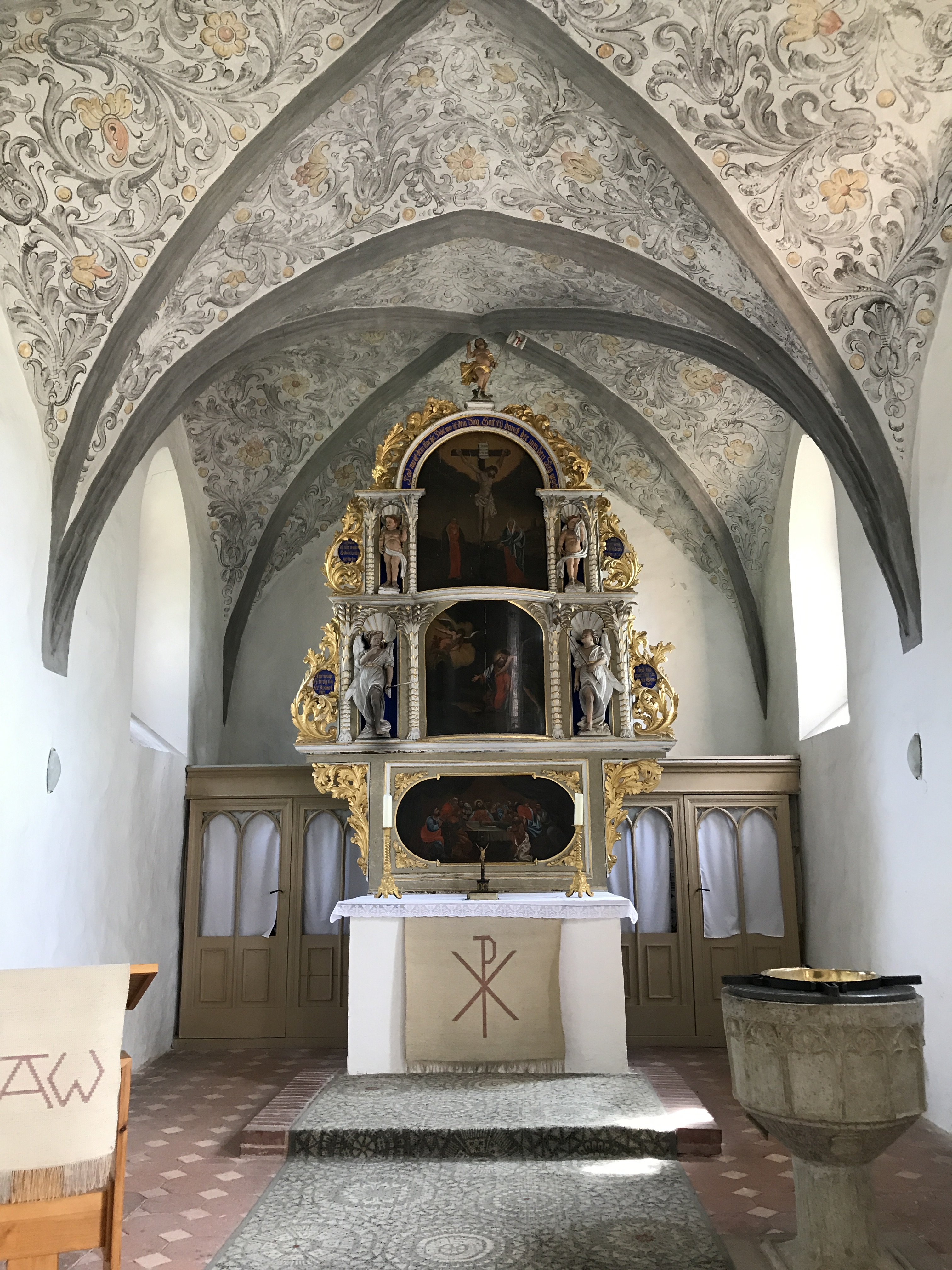 Die Dorfkirche Bochow ist eine gotische Feldsteinkirche in Bochow, einem Ortsteil der Gemeinde Niedergörsdorf in Brandenburg. Im Innern steht unter anderem ein Altaraufsatz von Gottfried Patzsch(en) aus dem Jahr 1701.